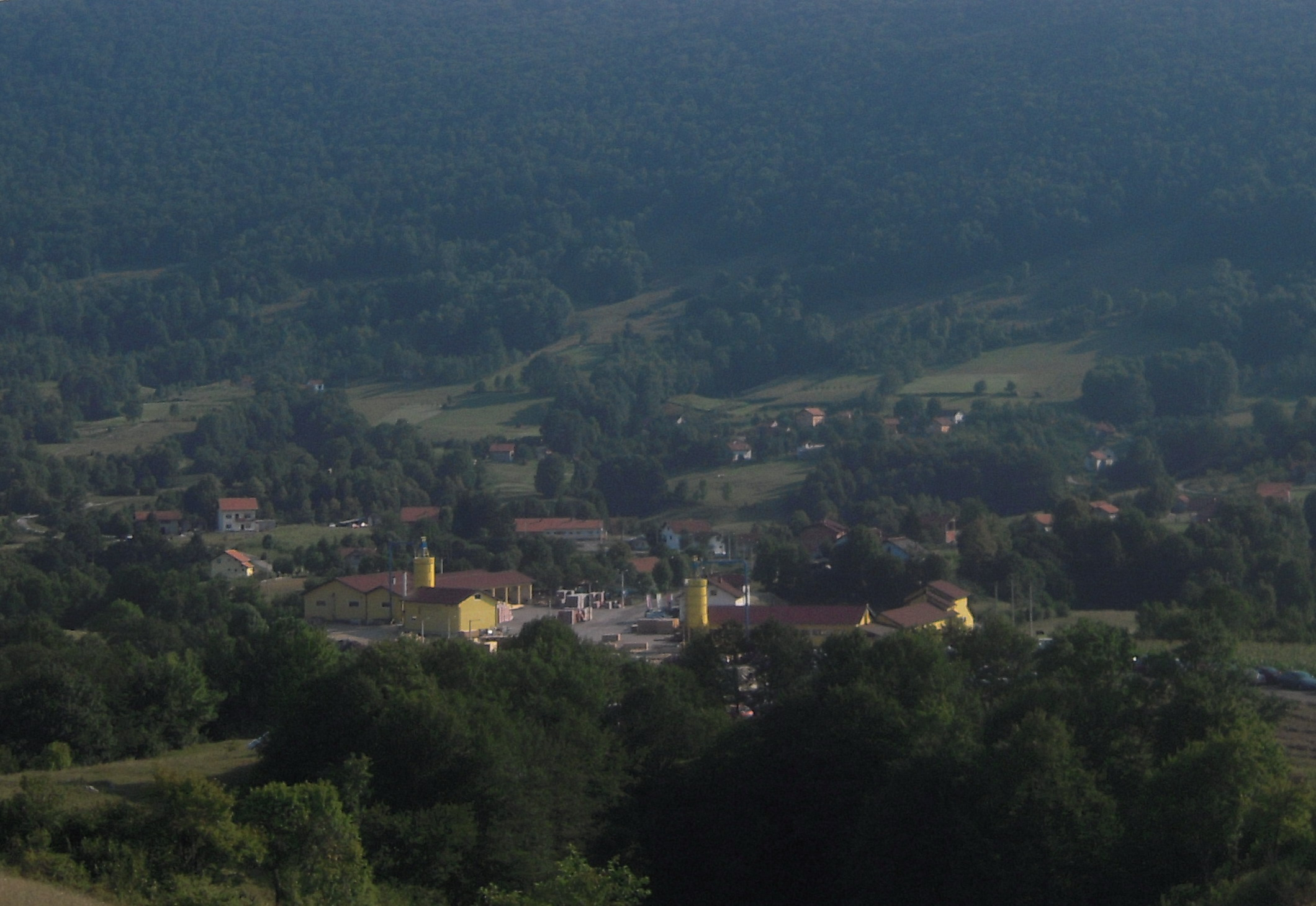 Љубачево